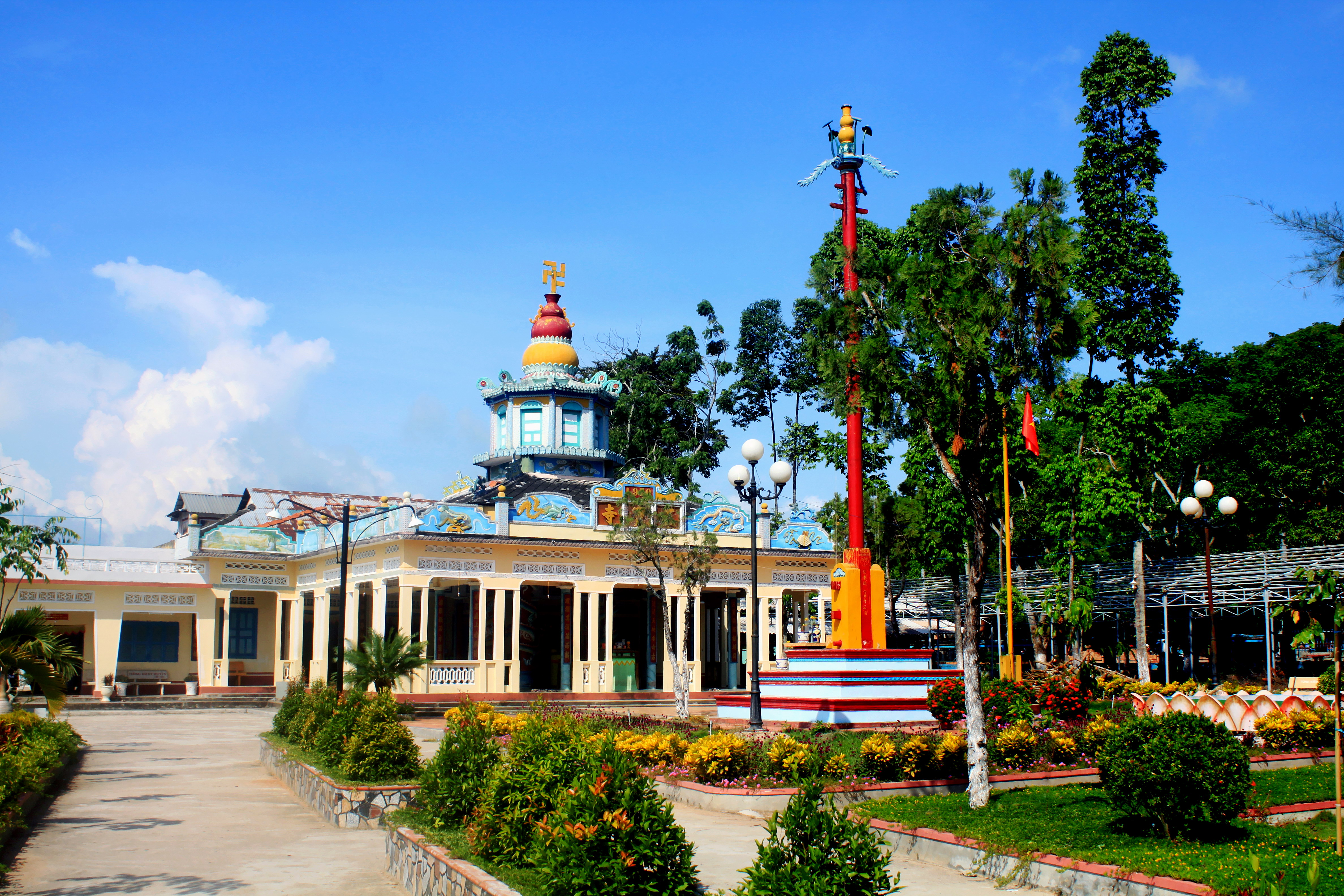 Chùa Tam Bửu ở thị trấn Ba Chúc, huyện Tri Tôn, tỉnh An Giang, Việt Nam.